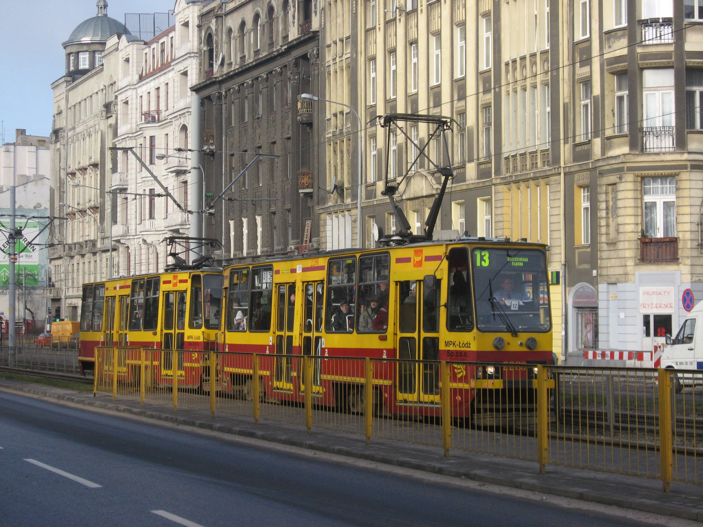 Łódź, tramvaj.